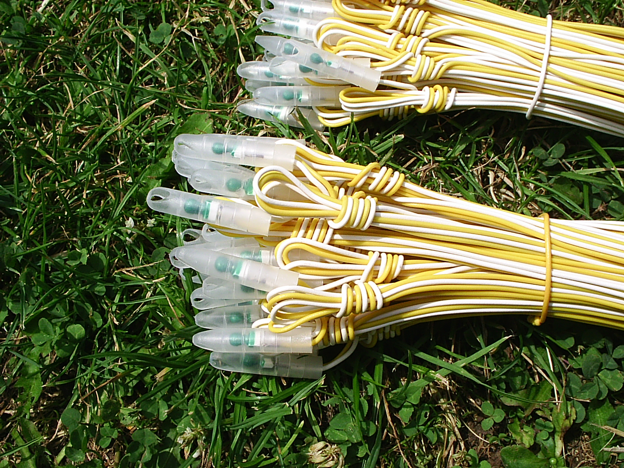 Tschechische Brückenzünder ohne BAM-Zulassung